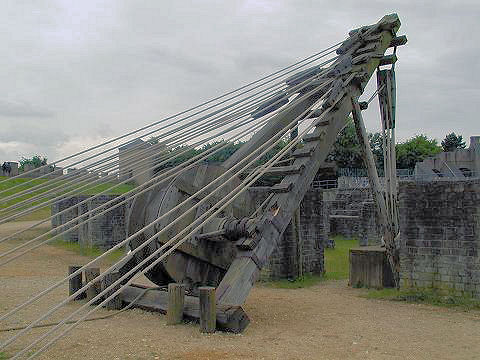 Römischer Baukran aus Xanten, Rekonstruktion, eigene Aufnahme vom 05.06.2004.